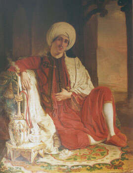 Possibly Self-portrait José Rodrigues